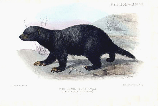 Mellivora capensis cottoni